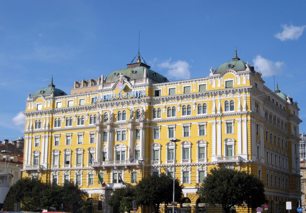 Palača "Jadran", zgrada Jadrolinije